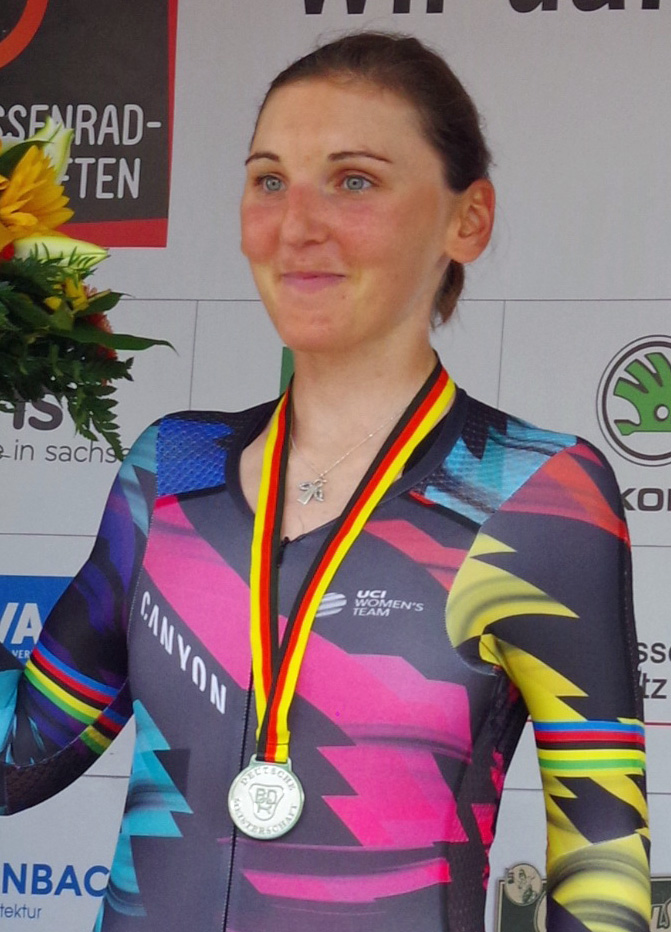 Platz 2: Lisa Brennauer, Deutsche Meisterschaften im Einzelzeitfahren 2017 23. Juni 2017.